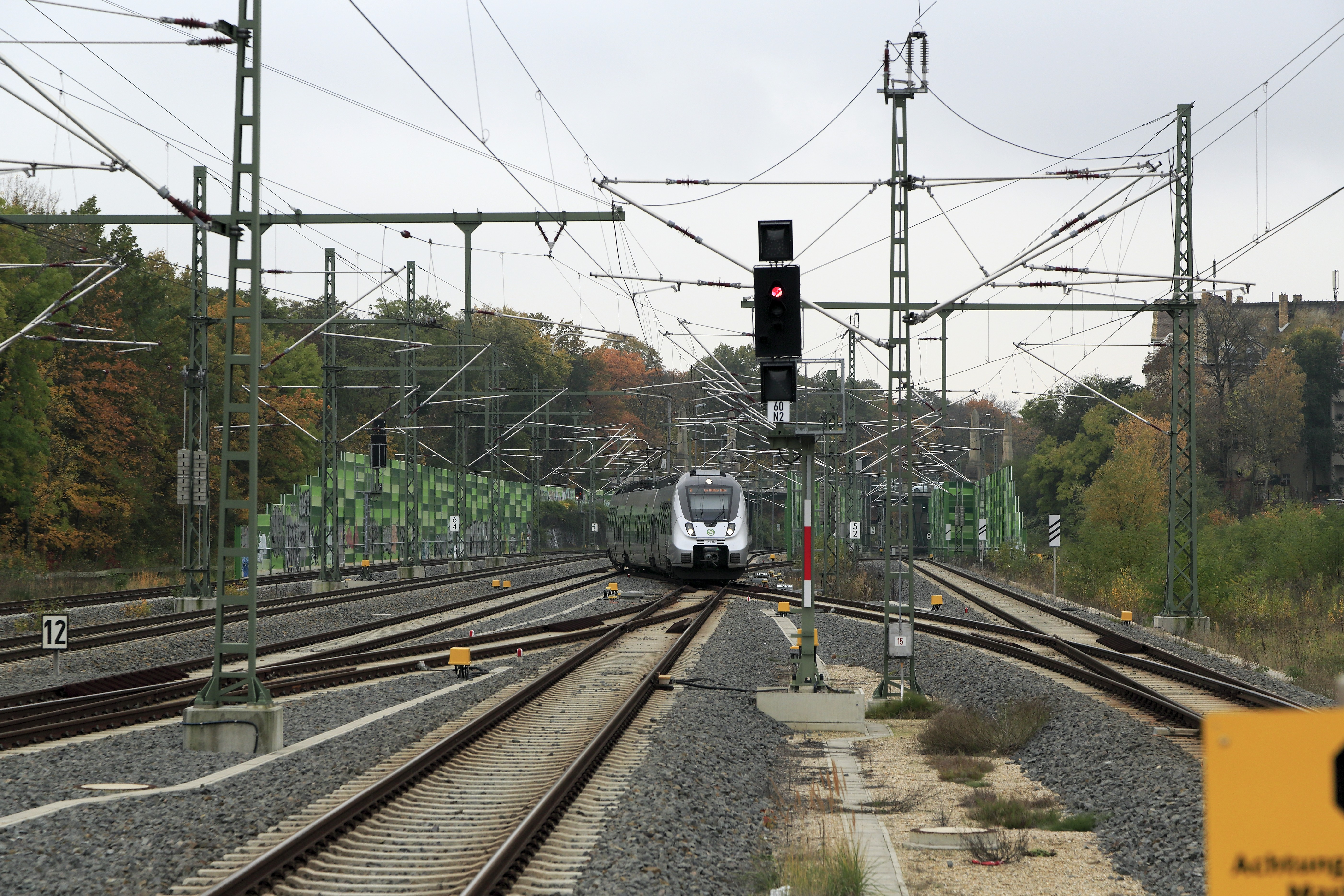 Ein einfahrender Zug der Linie S1 von der Stammstrecke in das Kopfgleis.